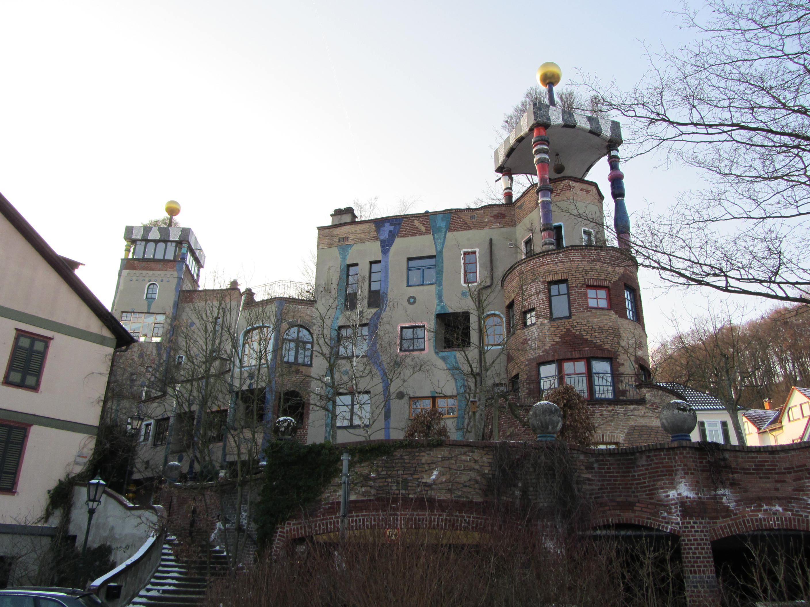 Hundertwasserhaus